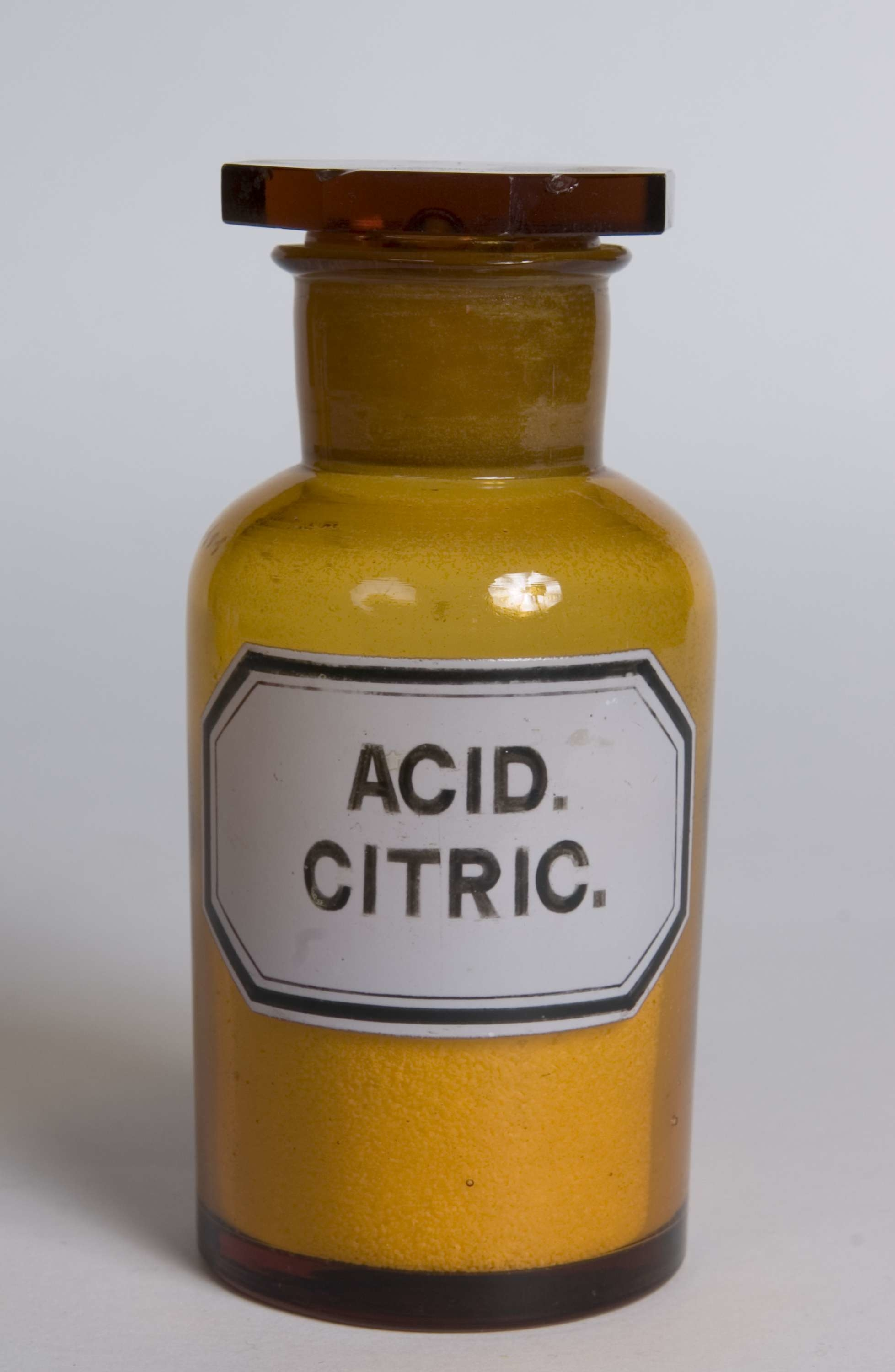 Standglass med propp. 8-kantet propp. Rund hals. Med innhold. Hvit emaljert etikett med svart ramme og svart skrift. Produksjon:Produsent, sikker: UkjentProduksjonssted: Ukjent sted.